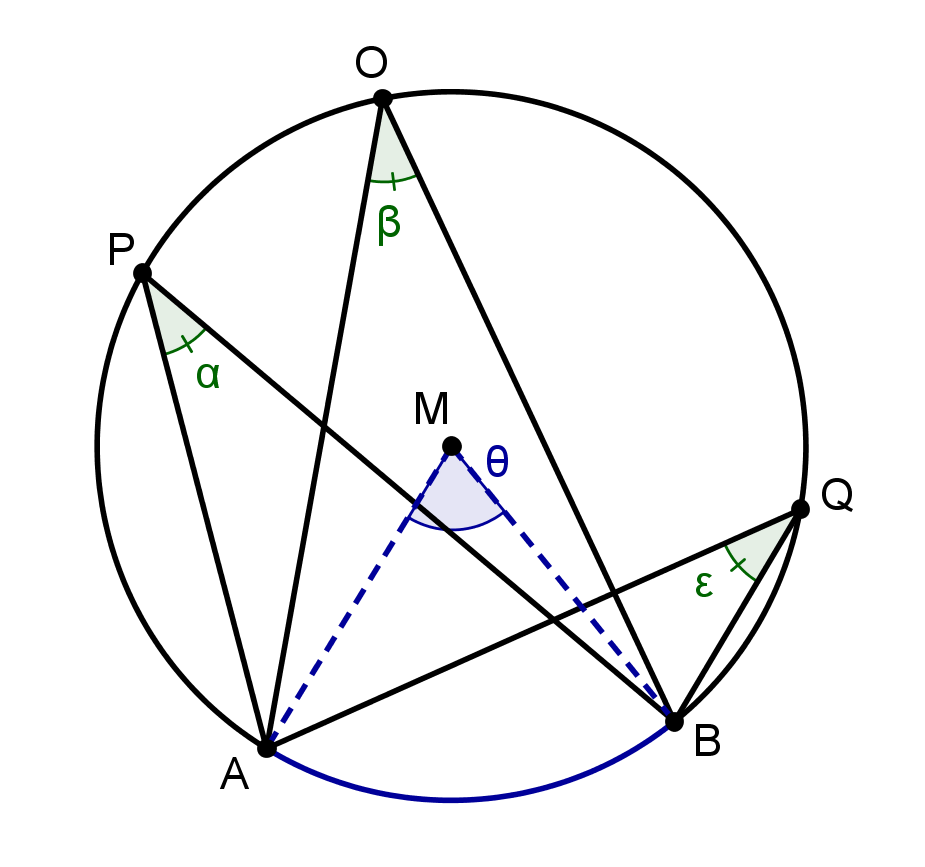 Hoeken op dezelfde boog